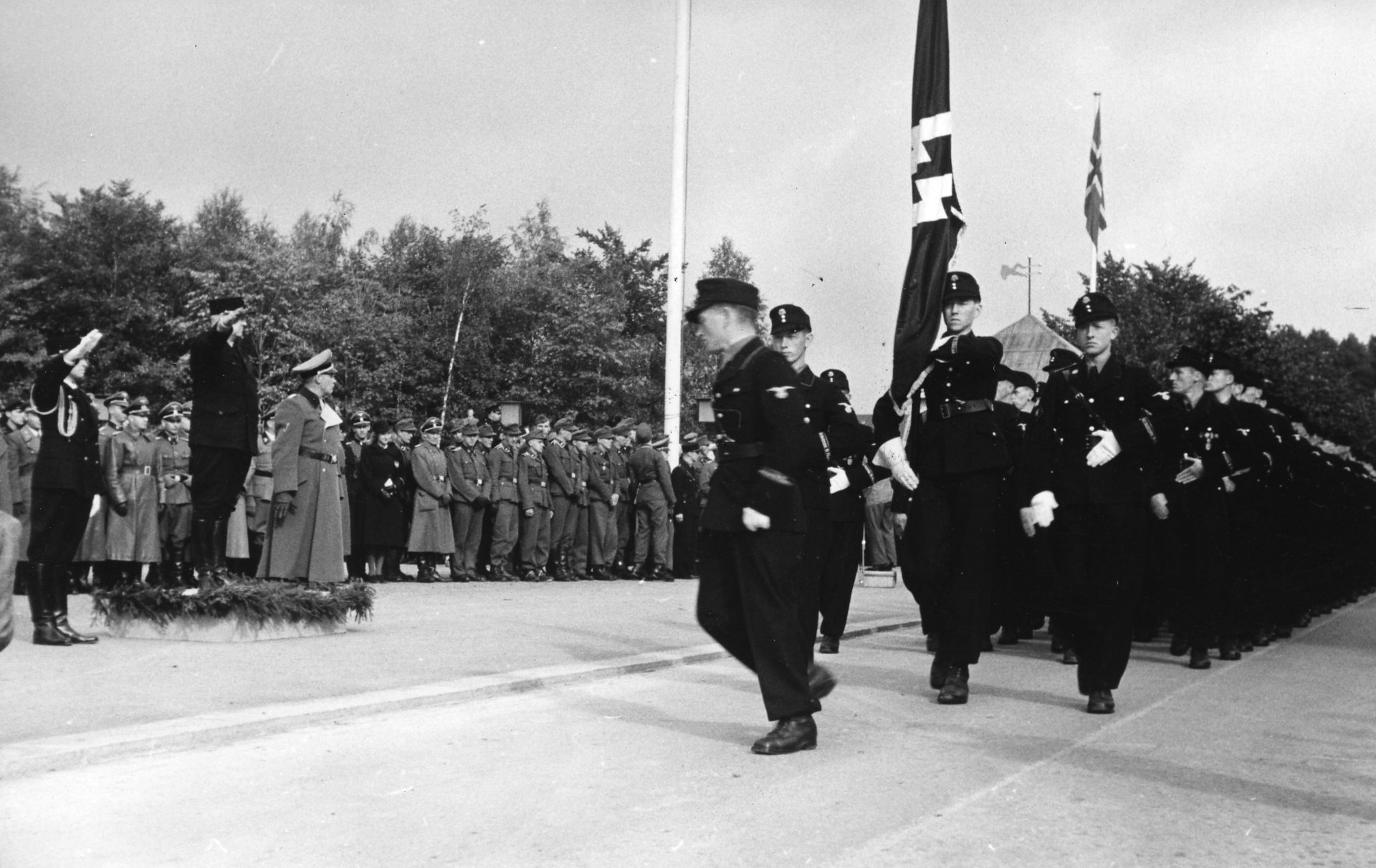 1942/09/27. RA/RAFA-3309/U 41B/10/41-10-12 img347